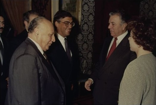 Il Presidente della Camera dei Deputati Irene Pivetti incontra il Presidente della Repubblica di Cipro Glafcos Clerides